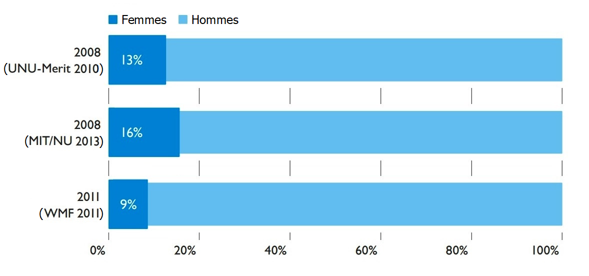 Proportion de femmes parmi les contributeurs de l'ensemble des versions linguistiques de Wikipédia. Sources des données : UNU-Merit 2010 : enquête de novembre 2008. MIT/NU 2013 : données de la même enquête ; méthodologie d'analyse différente. WMF 2011 : enquête d'avril 2011.